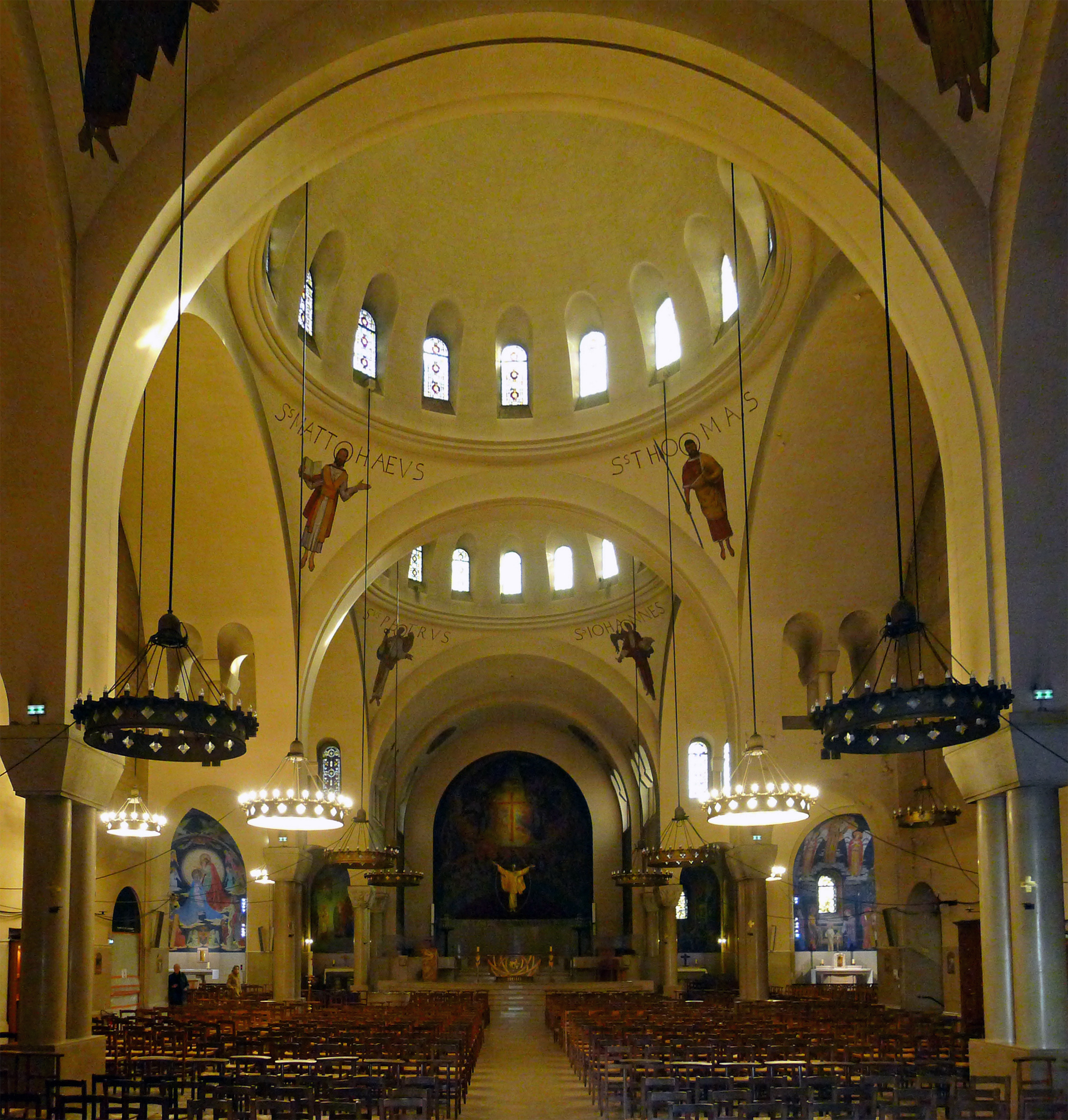 Église Saint-Ferdinand-des-Ternes (nef côté choeur) - Paris XVII